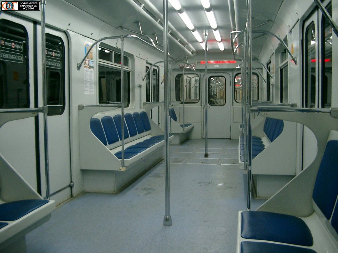 Metro car in Kazan'